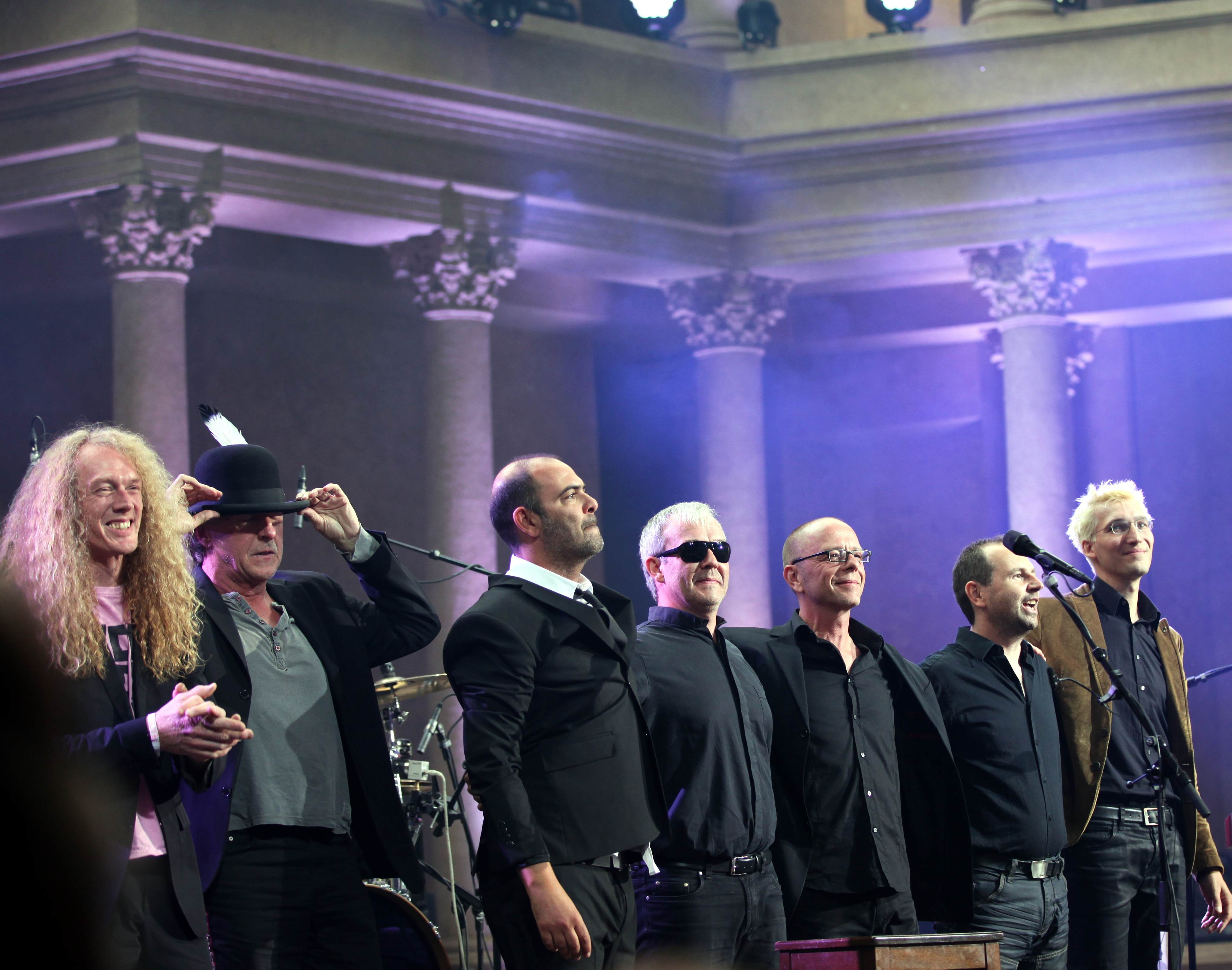 Hannes Ringlstetter mit Begleitmusikern auf dem Heimatsoundfestival 2015 von Links: Jochen Goricnik Edgar Feichtner Hannes Ringlstetter Georg Schiessl Lenz Retzer Michael Thomas Christian Schmalz